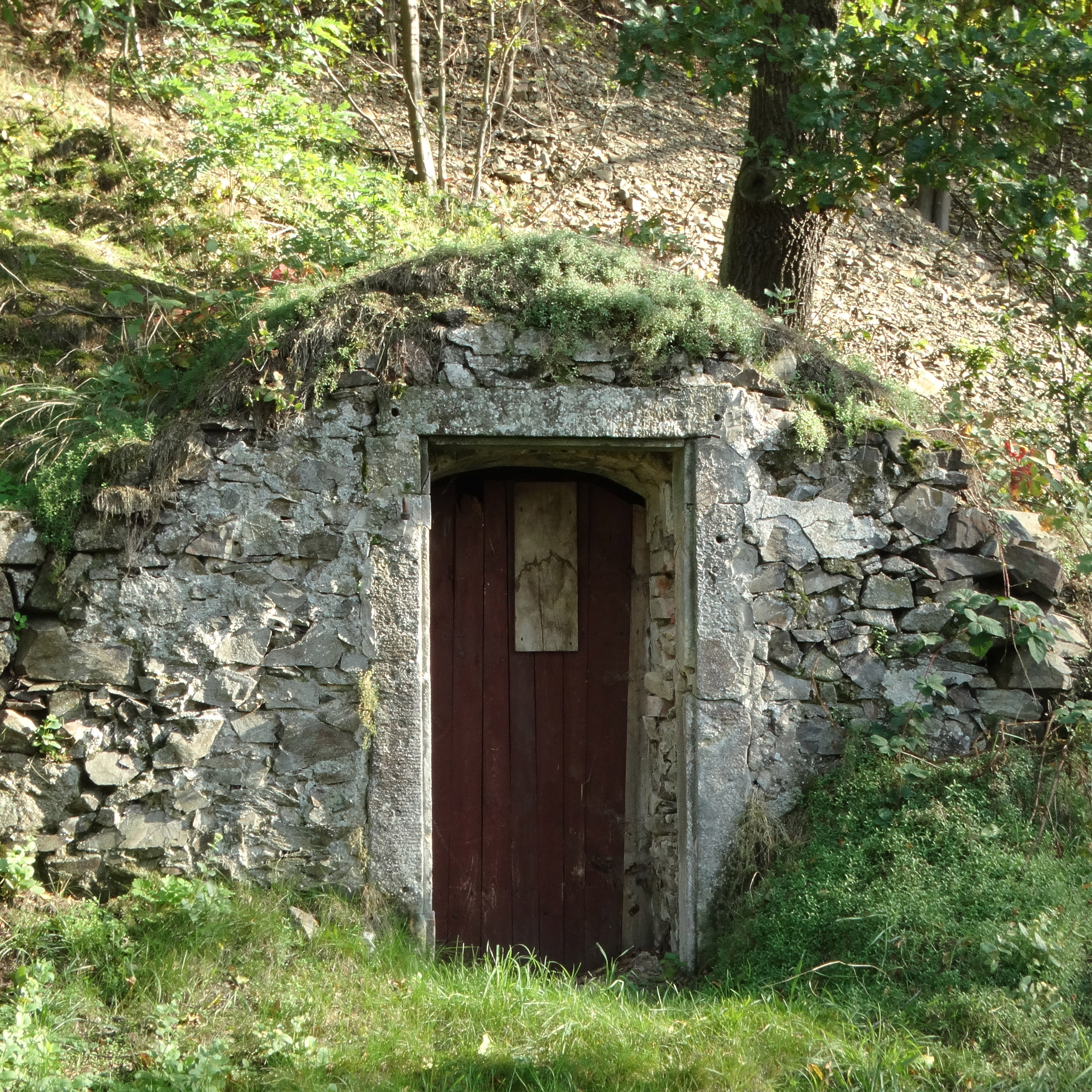 Nahe des rechten Ufers der Großen Röder befindet sich in einem Berghang dieser Eiskeller auf dem Auenweg in Großdittmannsdorf (Radeburg)